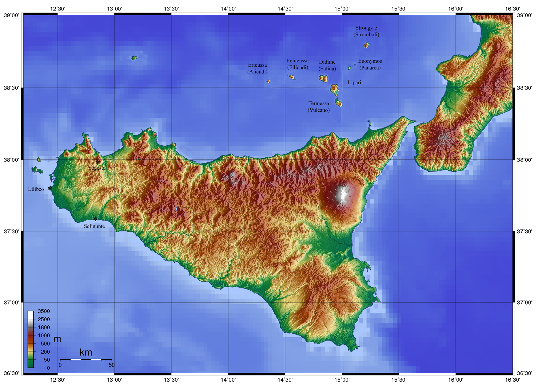 Elaborazione digitale di questa immagine, autore Zamonin, effettuata da Giorces. Eolie cnidie, ambito Sicilia.